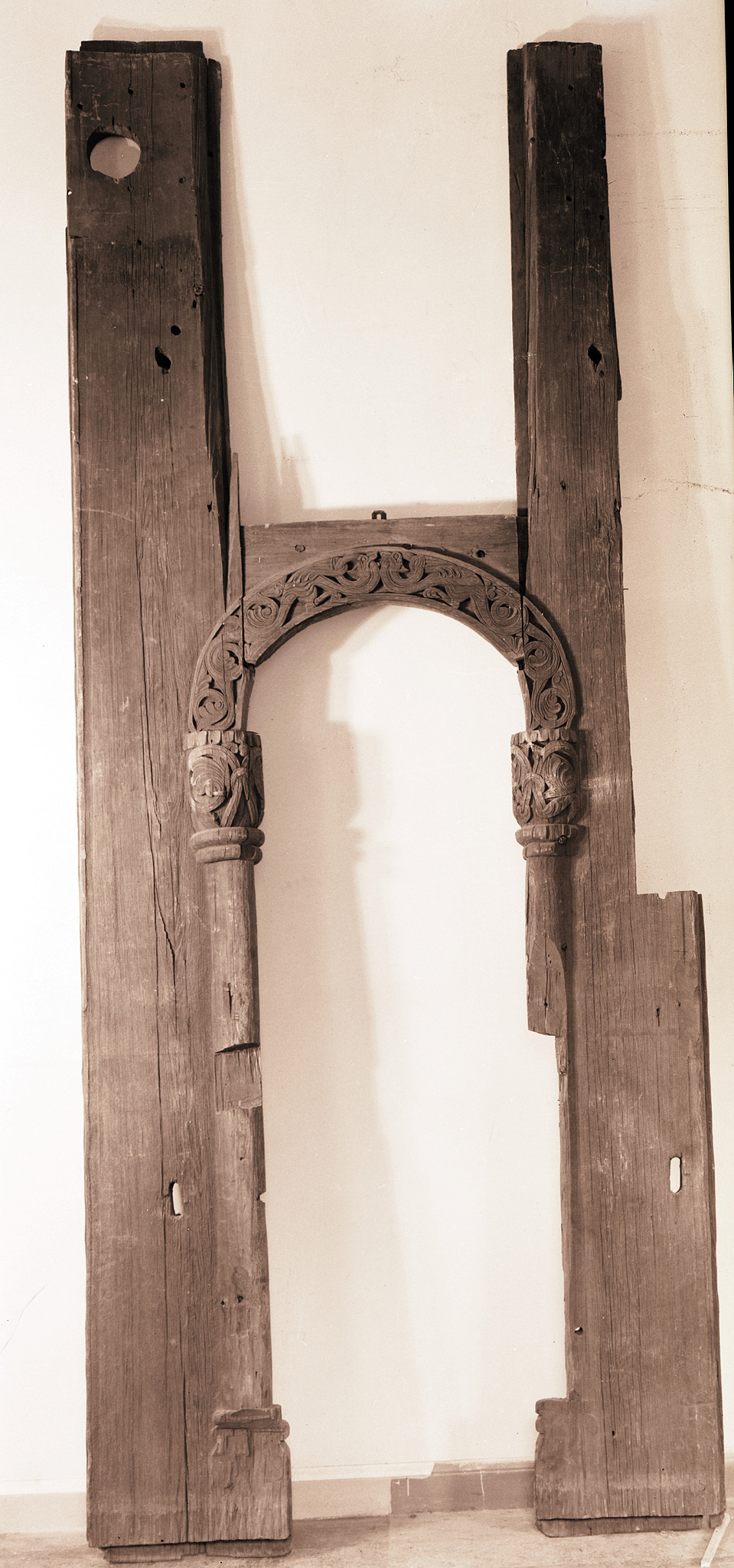 Sydportal fra Tuft stavkirke, revet 1880